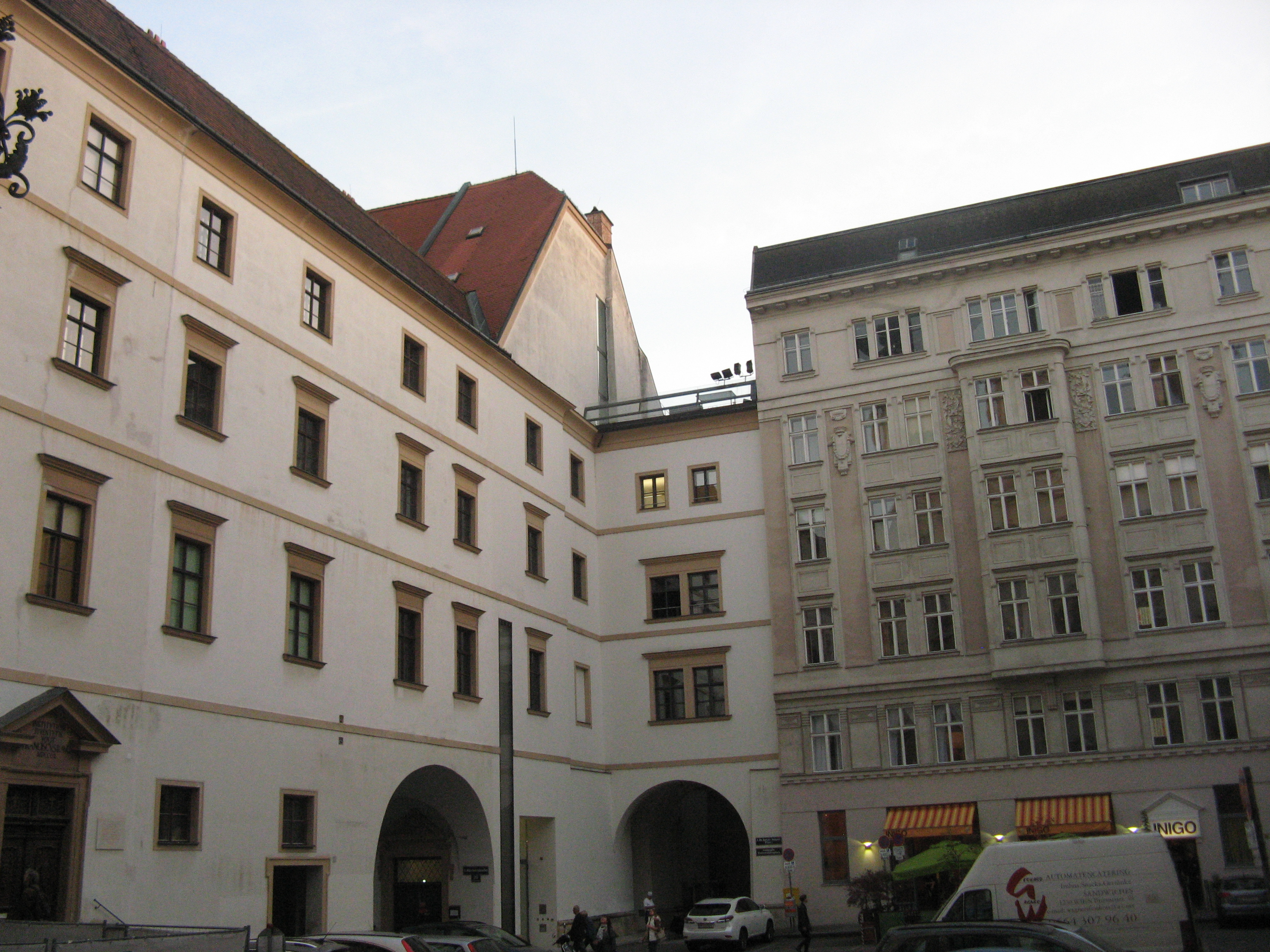 Dr.-Ignaz-Seipel-Platz, Wien-Innere Stadt